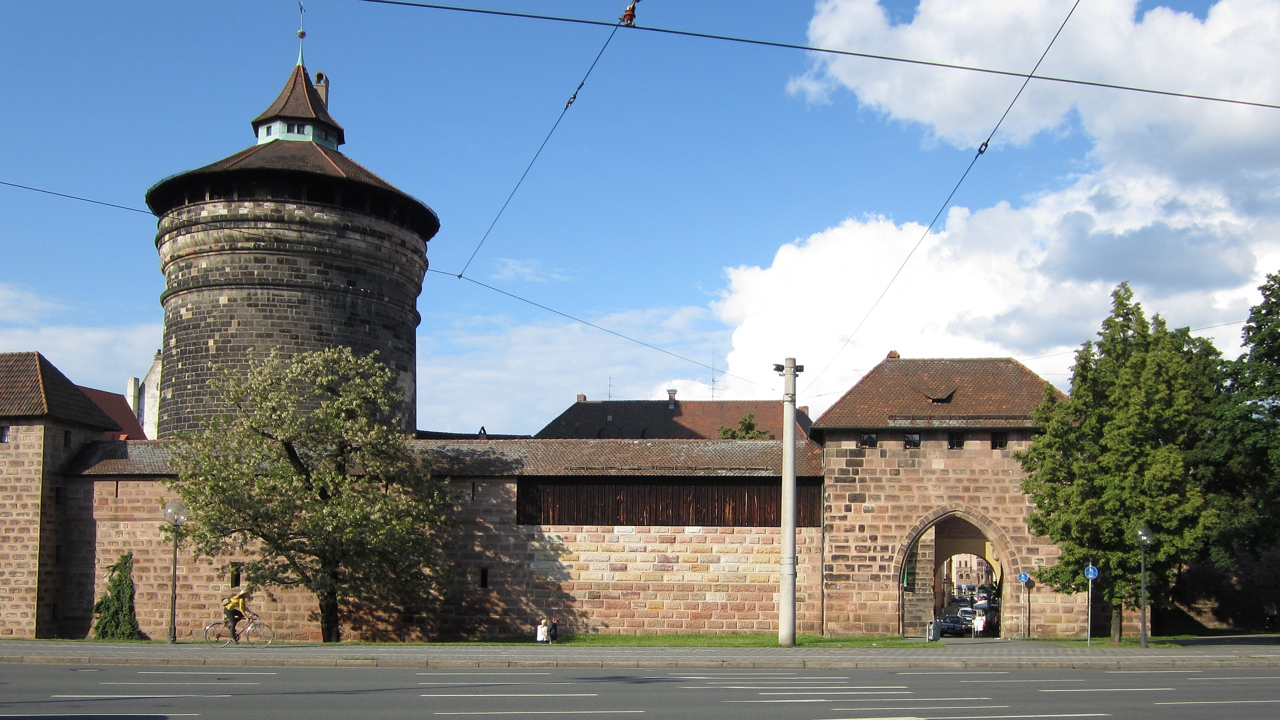 Nürnberg Spittlertorturm und Waffenhof